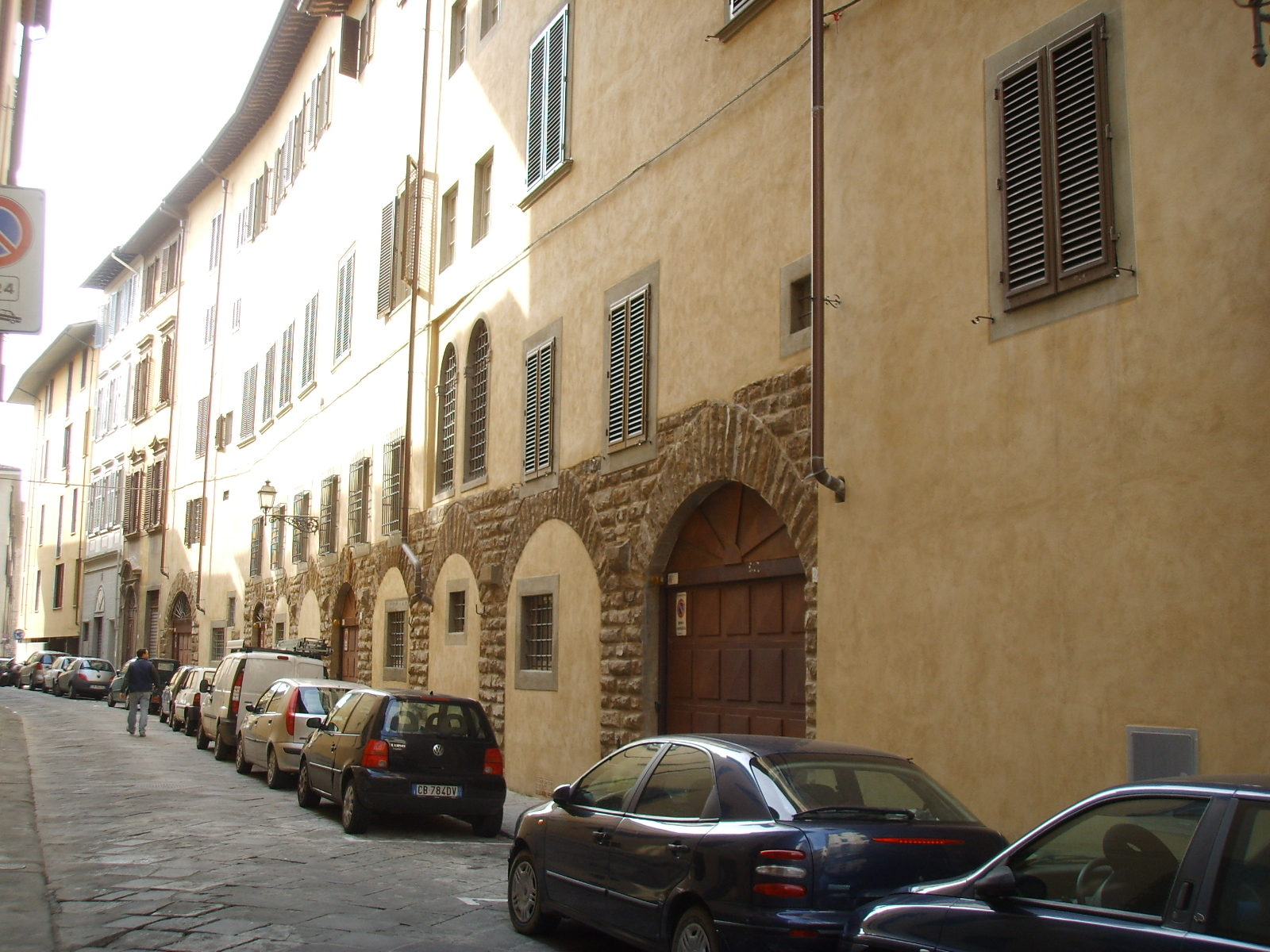 Palazzo busini-bardi lato